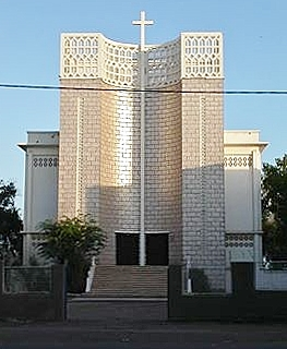 Façade de la cathédrale Notre-Dame-de-Bon-Pasteur de Djibouti.